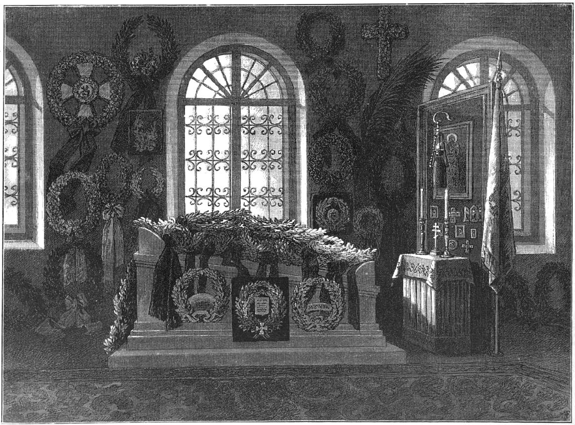 Гробница М. Д. Скобелева в церкви Спасского села. Рисунок К. О. Брожа по фотографиям фотографа-любителя.